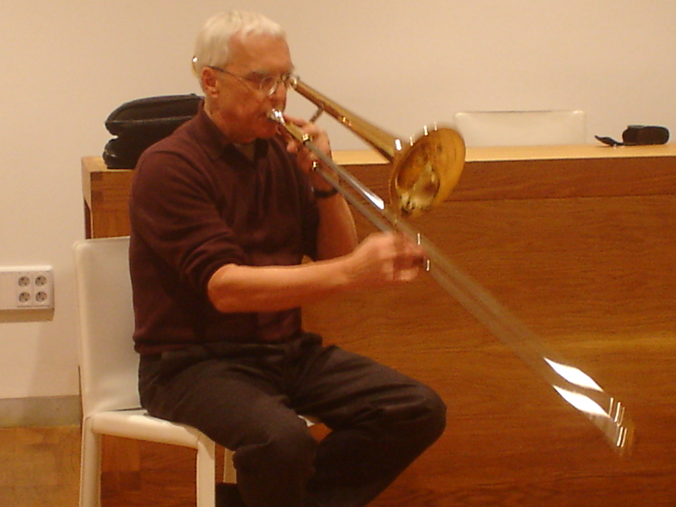 Radu Malfatti o 28 de novembro de 2008 probando antes do concerto que deu xunto a Taku Unami na Fundación Luis Seoane (A Coruña) detro do FFMI 2008